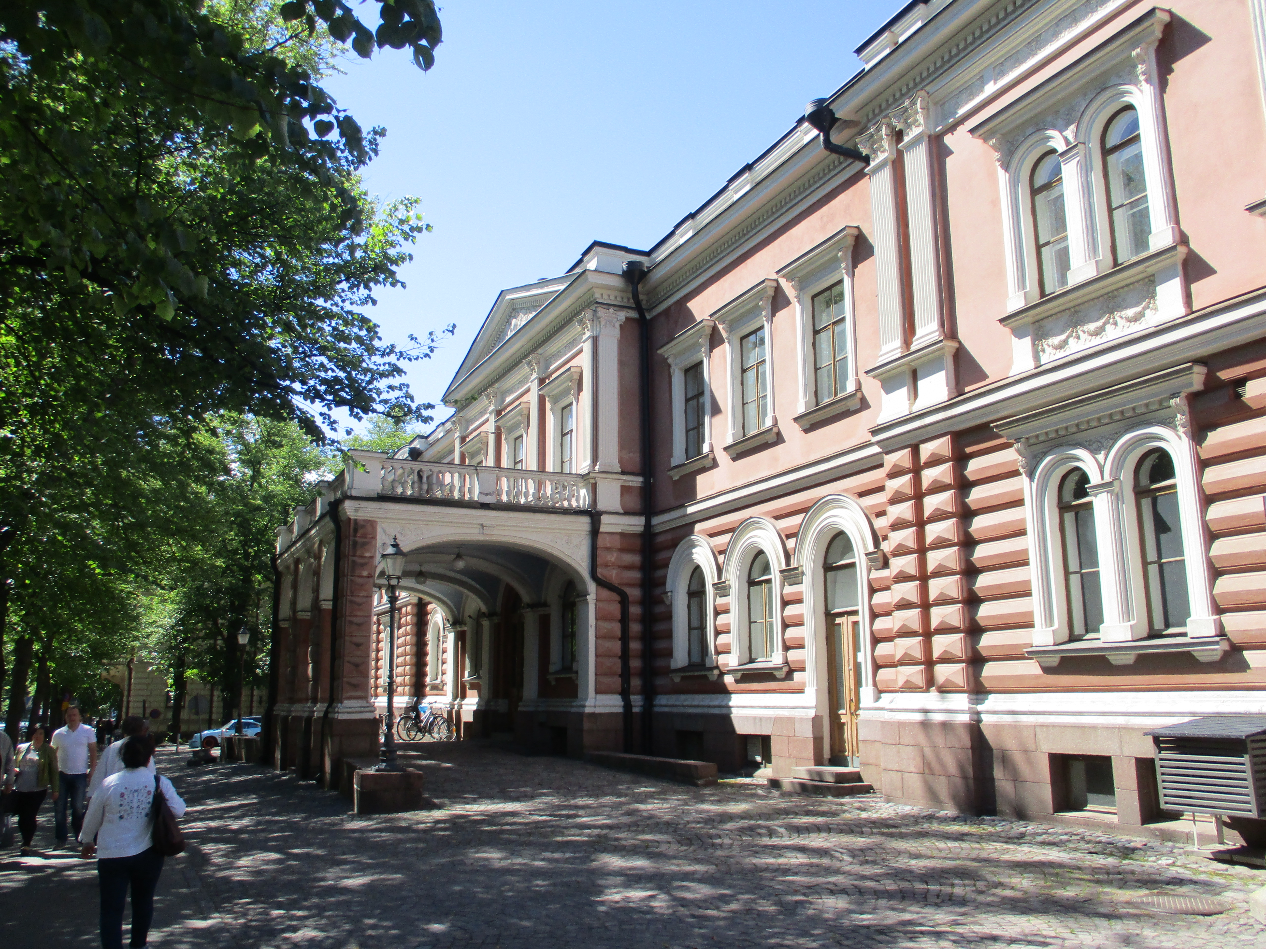 Aleksanterin teatteri